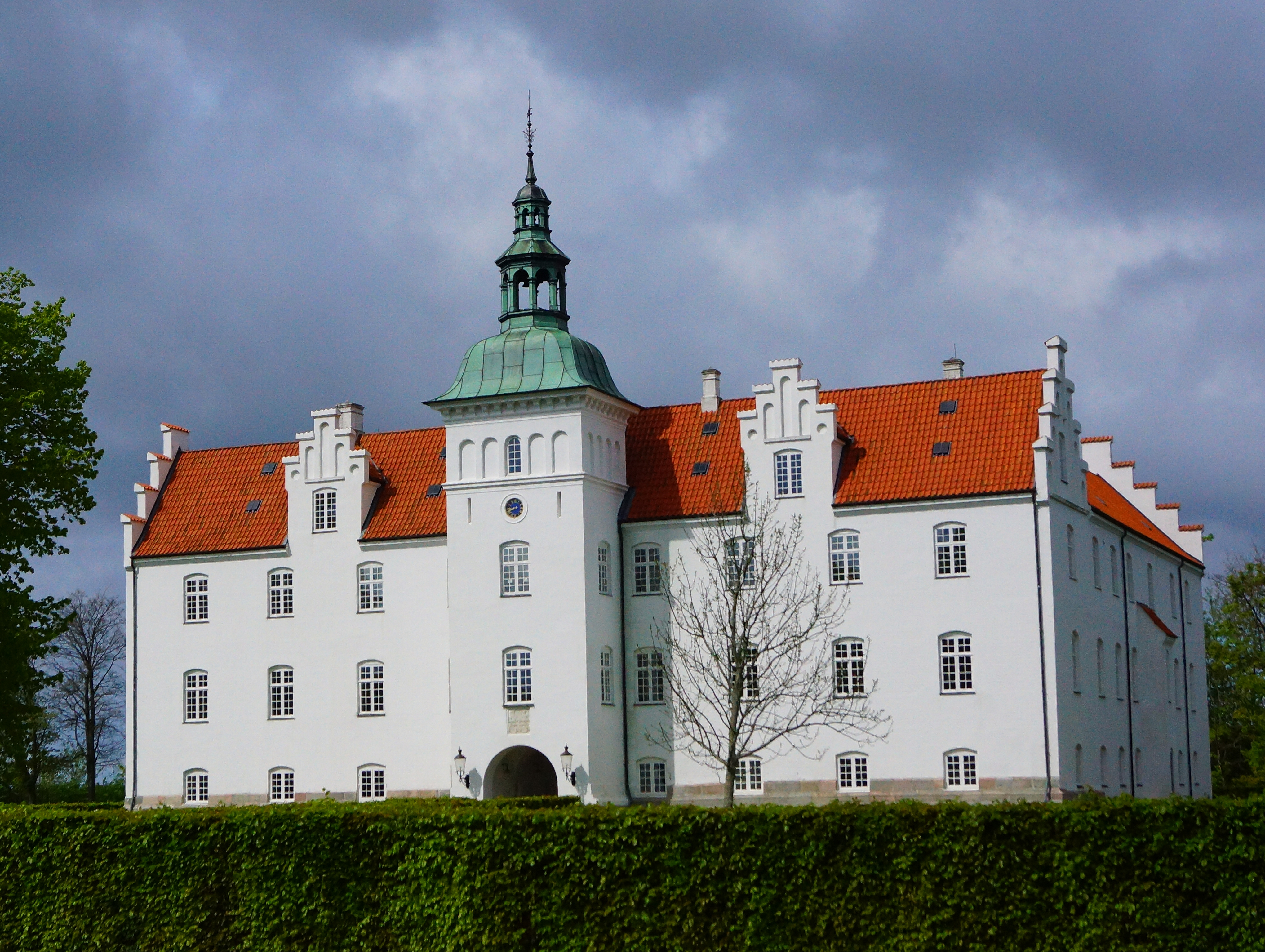 Meilgård Slot